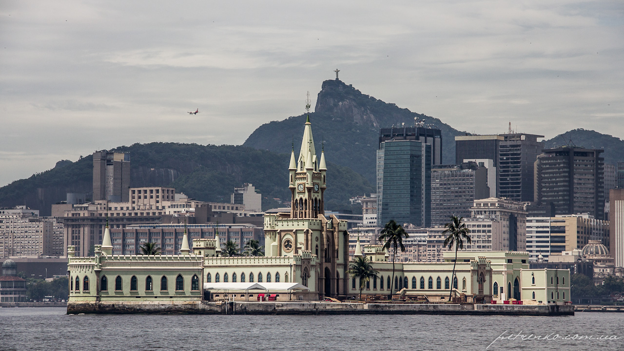 Pte. Pres. Costa e Silva, 1046 - Paciencia, Rio de Janeiro - RJ, Brazil